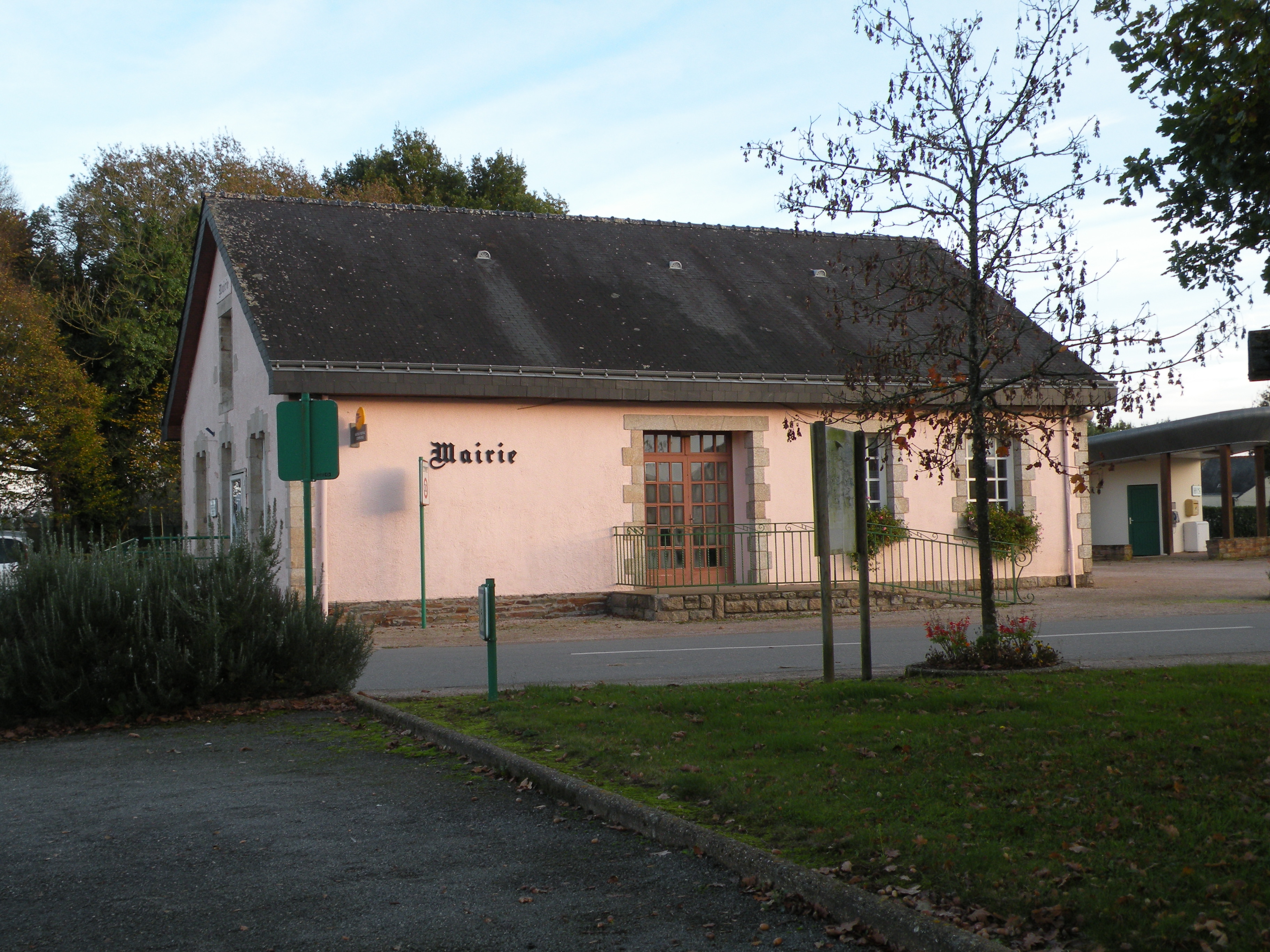 Mairie de Théhillac.